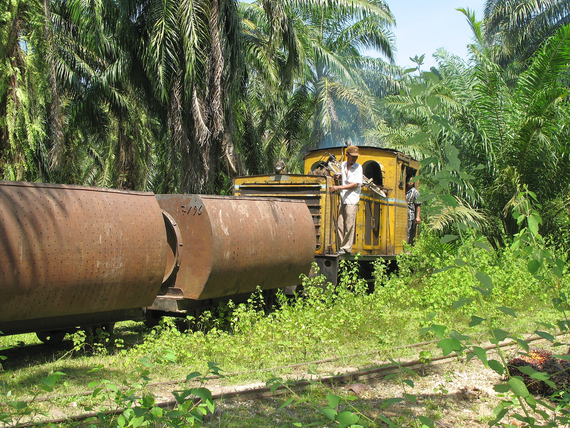 Sawit Seberang, 31.07.2008